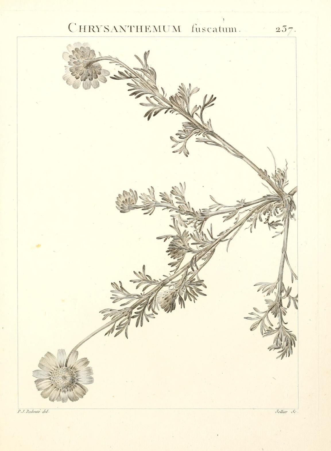 C HRYSANTHEMUM fnscatum 25", P.J.lteJottte ,/e/ Je//t4.r Jc